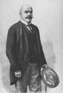 Kasimir Felix Graf Badeni (1846-1909), Ministerpräsident und Innenminister von Österreich